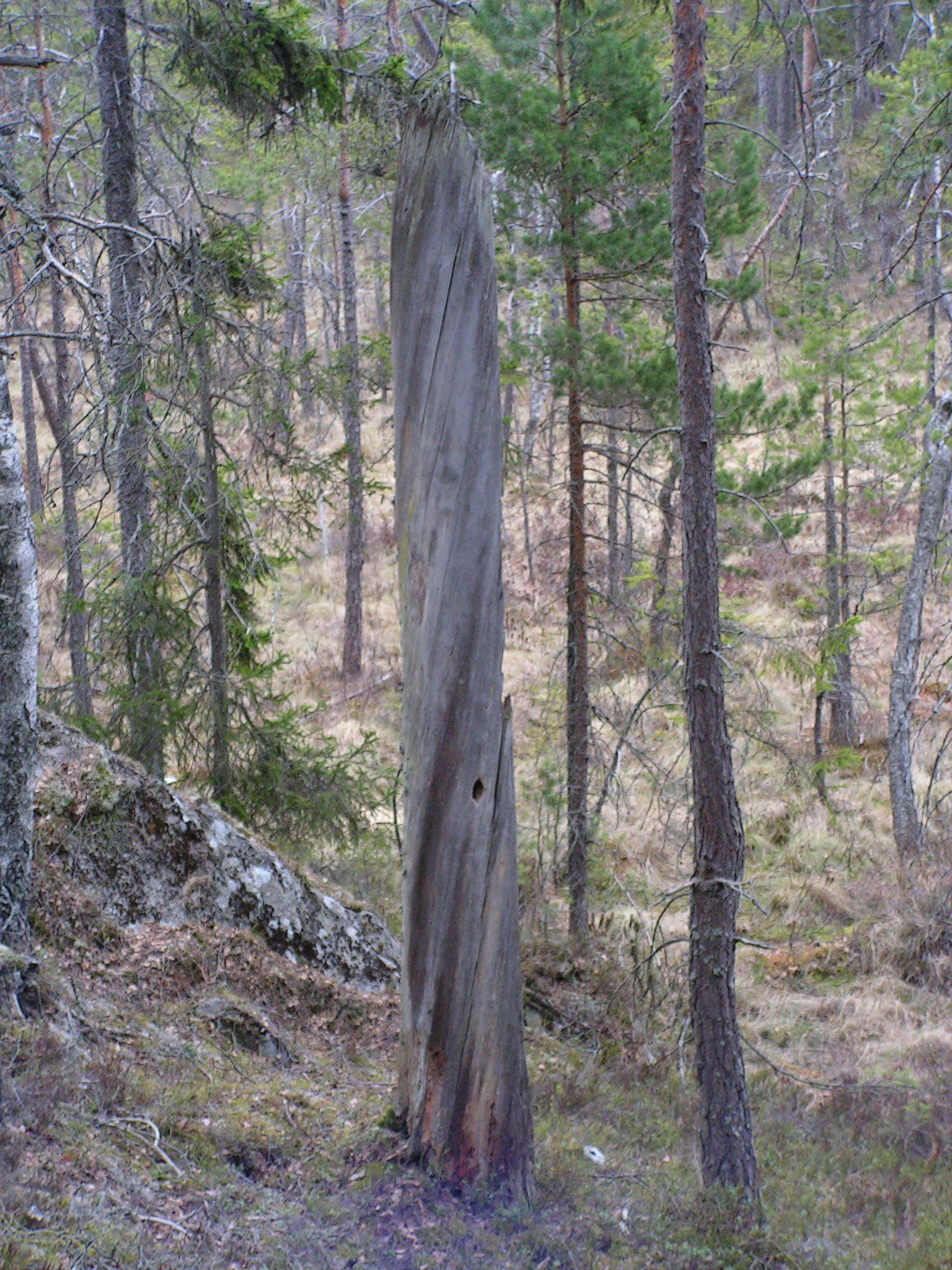 Naturskog, Sverige, Tyresta